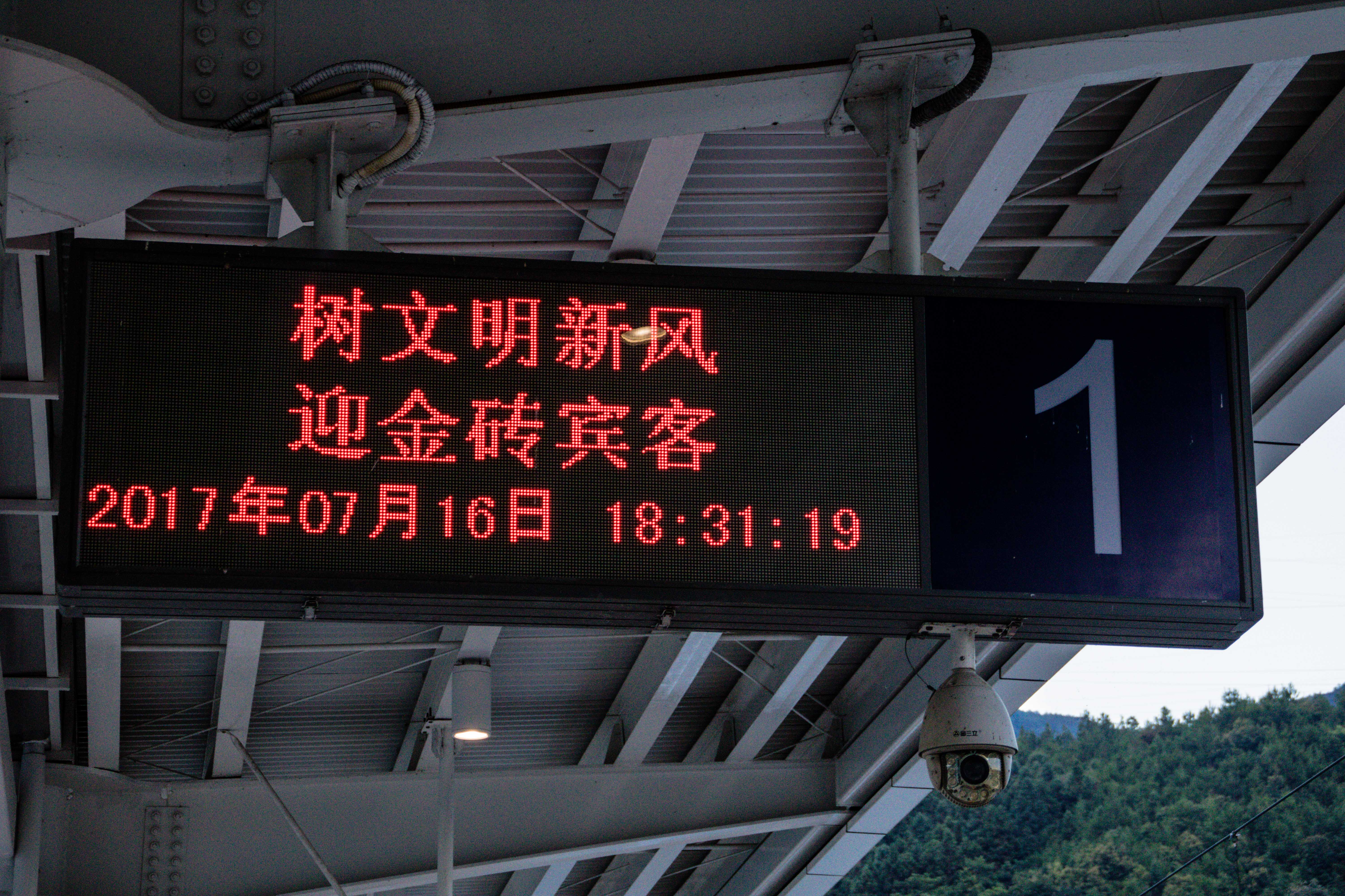 中文（中国大陆）: 古田北站金砖会议的宣传标语